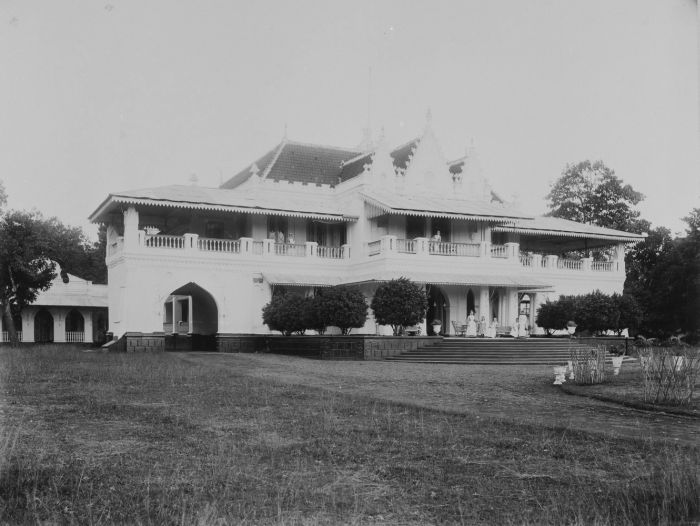 Foto. Ziekenhuis in Batavia, gevestigd in het voormalige huis van kunstschilder Raden Saleh